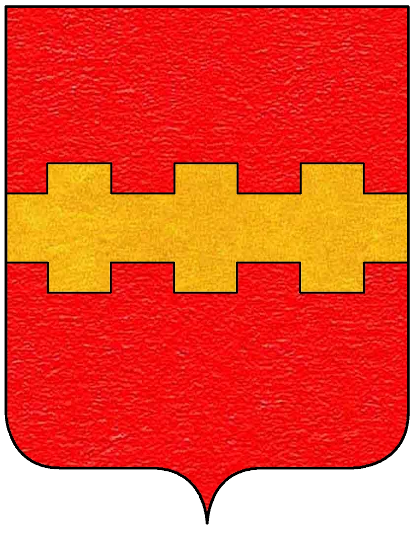 Stemma della famiglia Aliotti